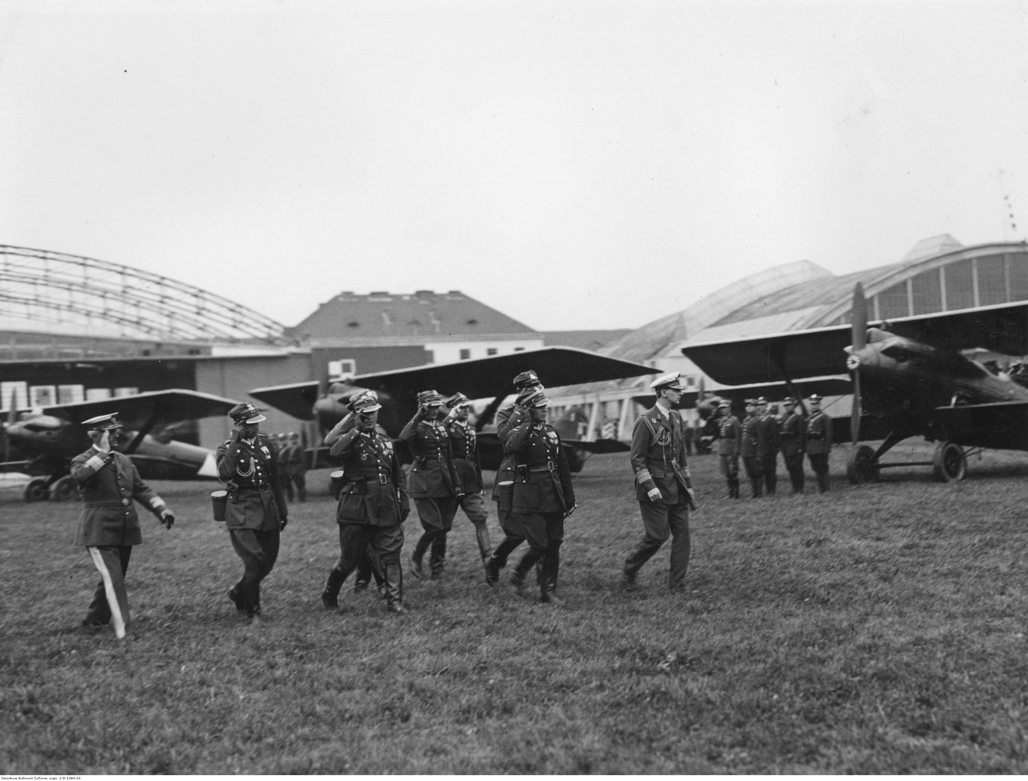 Wizyta brata króla Rumunii księcia Mikołaja w Polsce. Brat króla Rumunii książę Mikołaj (1. z prawej) w towarzystwie polskich wojskowych oraz attache wojskowego Poselstwa Rumunii w Polsce płk.S. Constantina (1. z lewej) zwiedza lotnisko wojskowe na Okęciu. Z prawej widoczne samoloty Breguet 19 B2. Koncern Ilustrowany Kurier Codzienny - Archiwum Ilustracji. Sygnatura: 1-D-1384-10